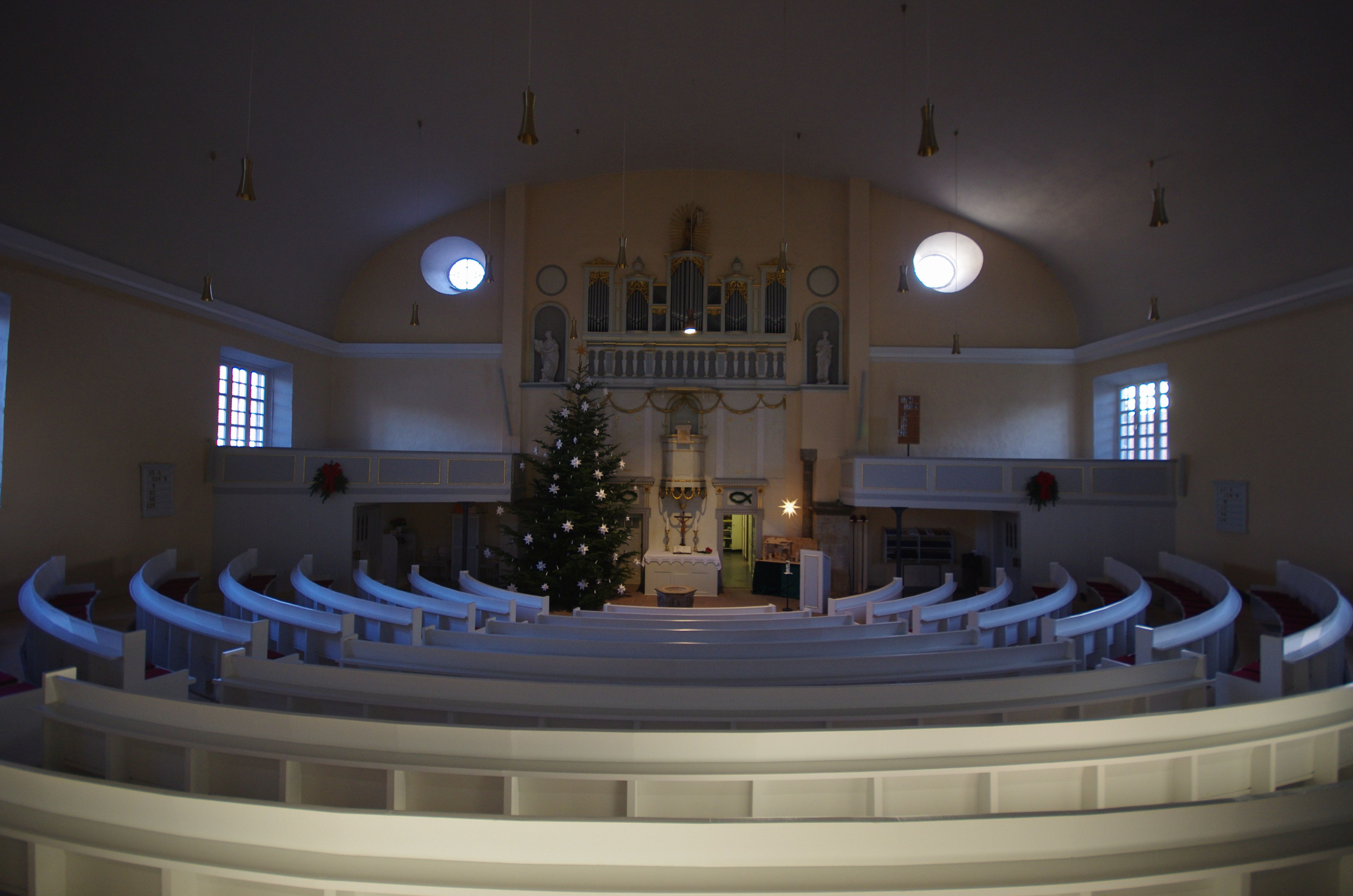 Pattensen in Niedersachsen. Das Bild zeigt Detail der evangelischen Kirch St. Lukas in Pattensen. Die Kirche ist als Denkmal geschützt.